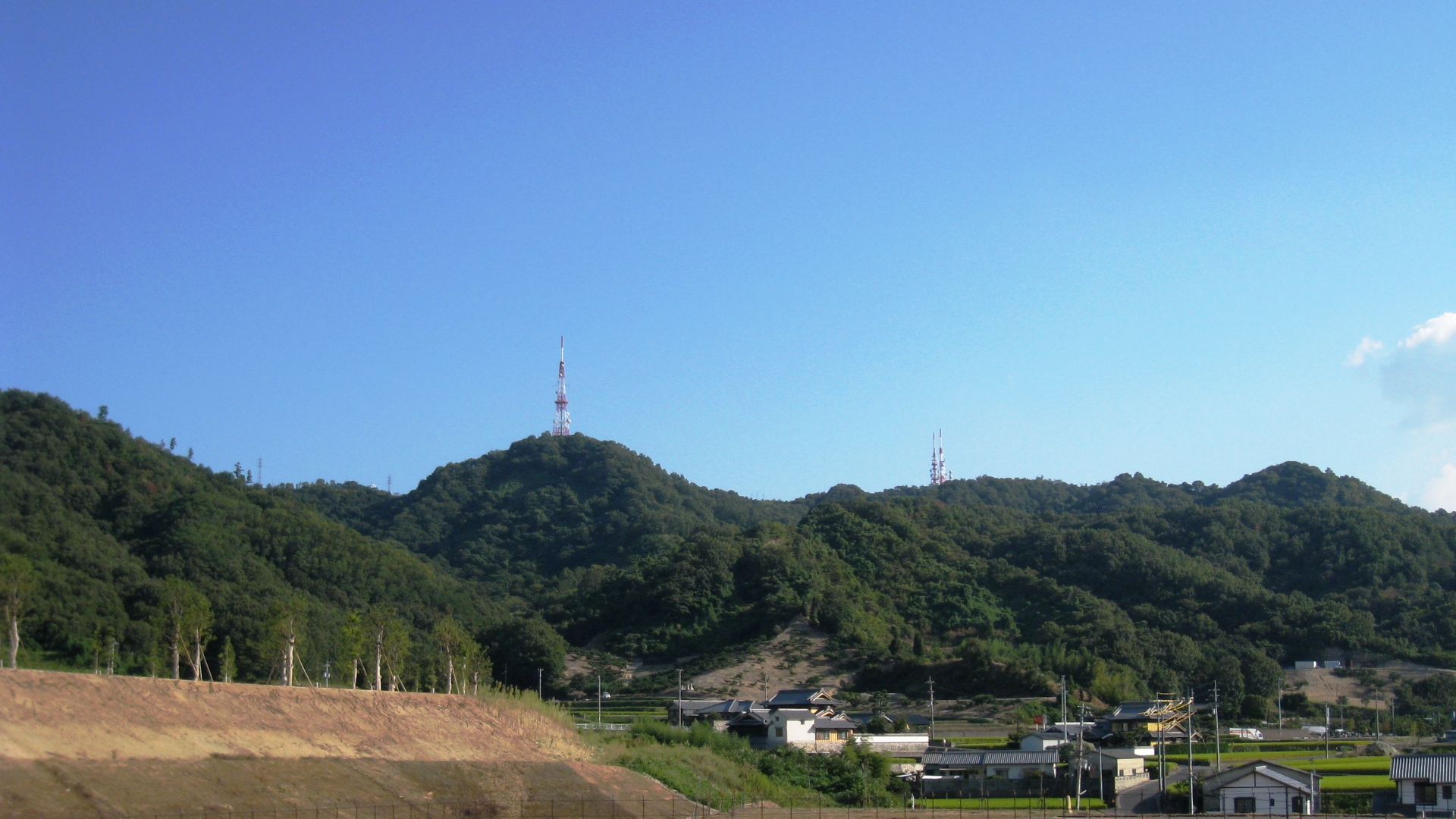 Maedayama radio towers in Takamatsu, Kagawa Japan